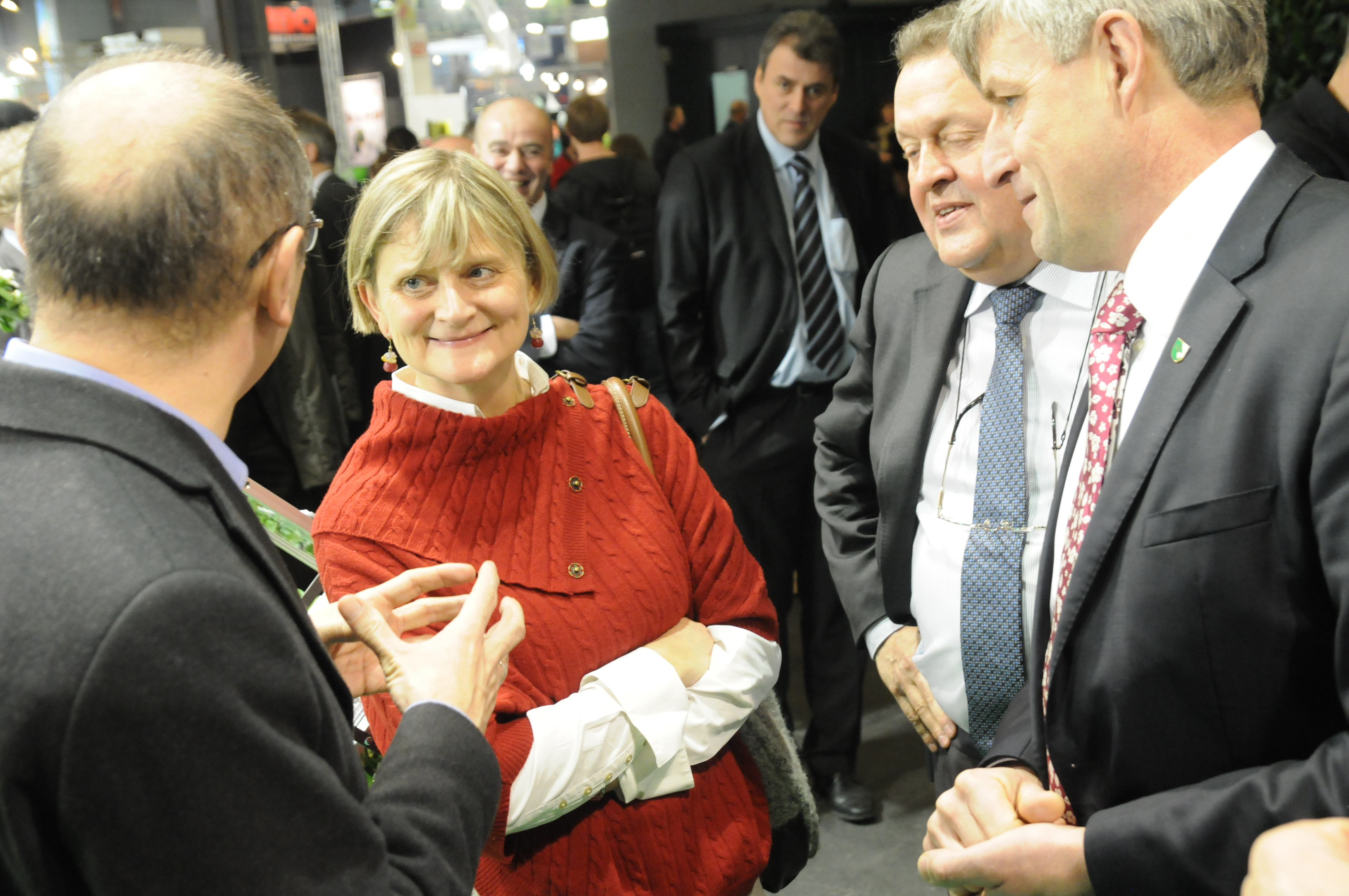 Sabine Laruelle au salon Agriflanders en 2013.